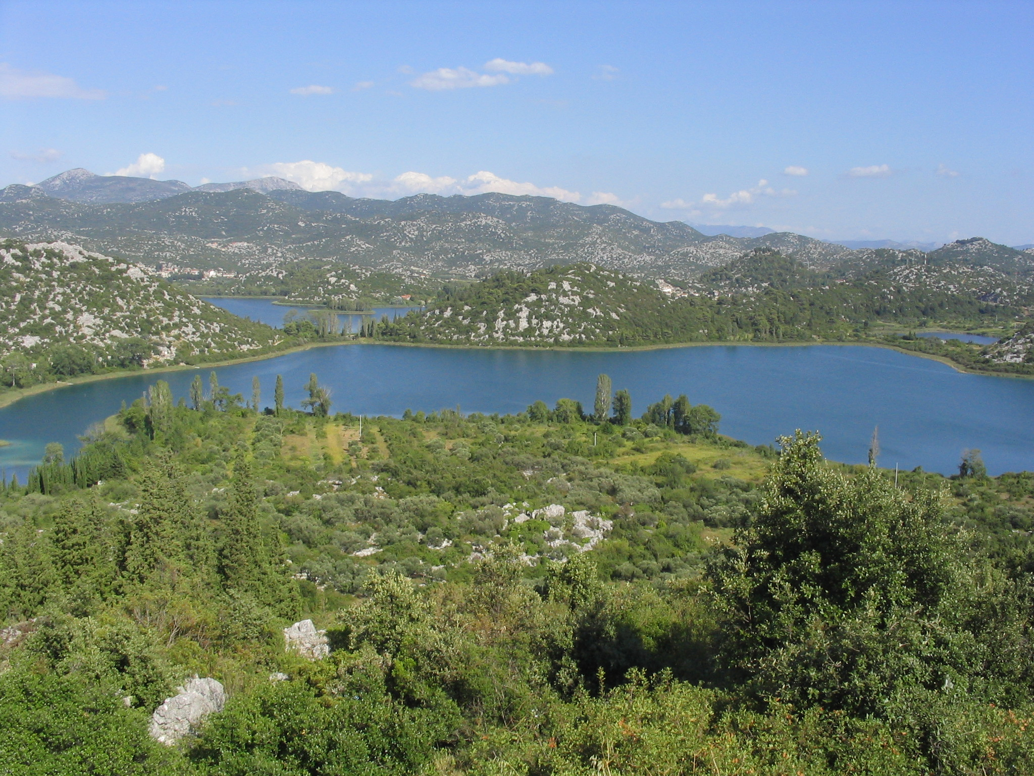 Blick auf die Bačina-Seen in Kroatien von der Küstenstraße aus. Aufgenommem am 15.08.2006 von Dr. Hagen Graebner